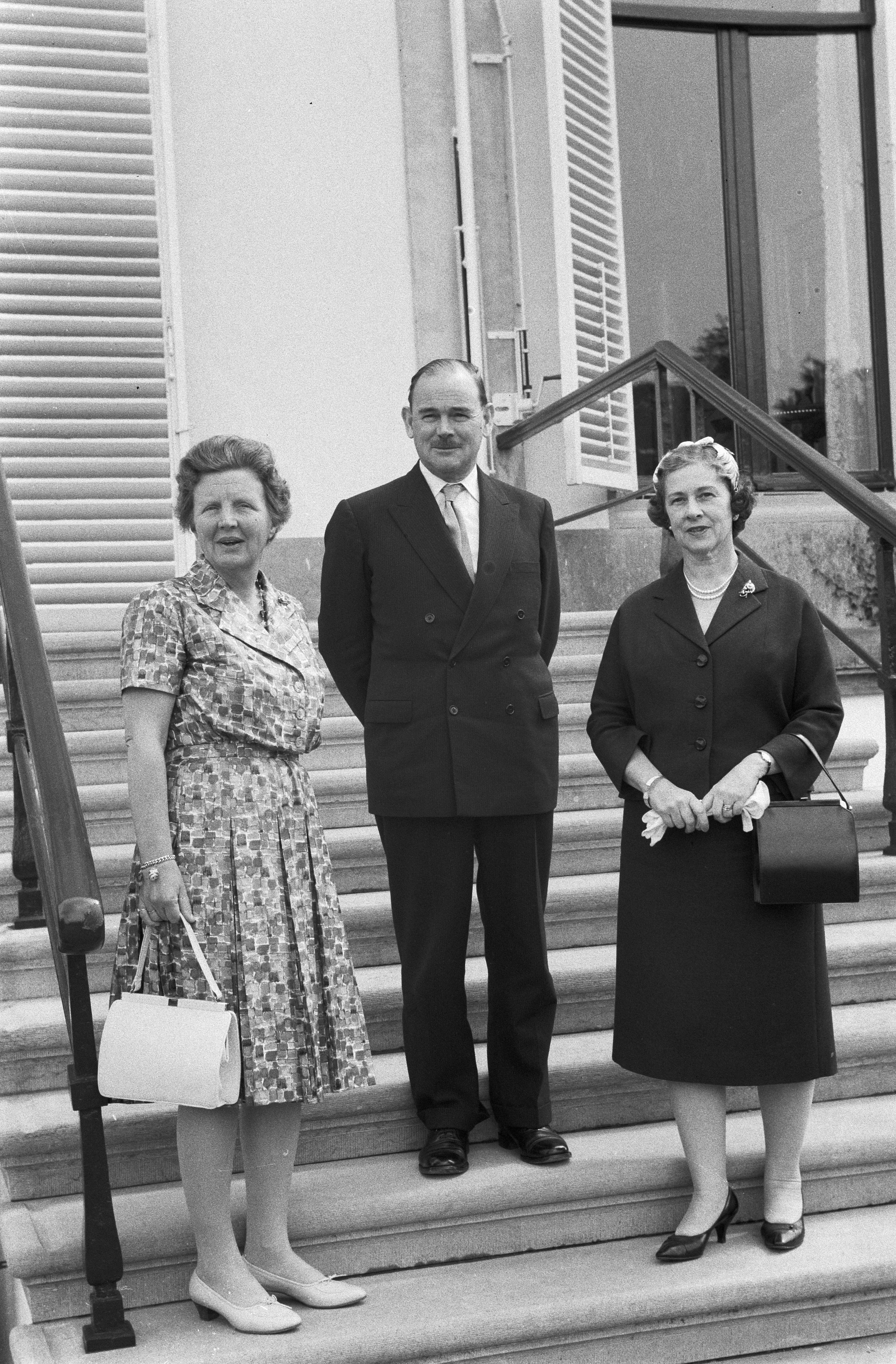 Collectie / Archief : Fotocollectie Anefo Reportage / Serie : Koningin Juliana ontvangt de Australische minister van Niet-autonome Gebieden Paul Hasluck en zijn echtgenote op paleis Soestdijk Beschrijving : V.l.n.r. koningin Juliana, minister Hasluck en mevrouw Hasluck Datum : 25 mei 1960 Locatie : Baarn, Utrecht (provincie) Trefwoorden : koninginnen, ministers, ontvangsten Persoonsnaam : Hasluck, Paul Meernaa Caedwalla, Juliana (koningin Nederland) Fotograaf : Fotograaf Onbekend / Anefo, [onbekend] Auteursrechthebbende : Nationaal Archief Materiaalsoort : Negatief (zwart/wit) Nummer archiefinventaris : bekijk toegang 2.24.01.05 Bestanddeelnummer : 911-2797